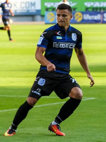 Максим Третьяков - український футболіст